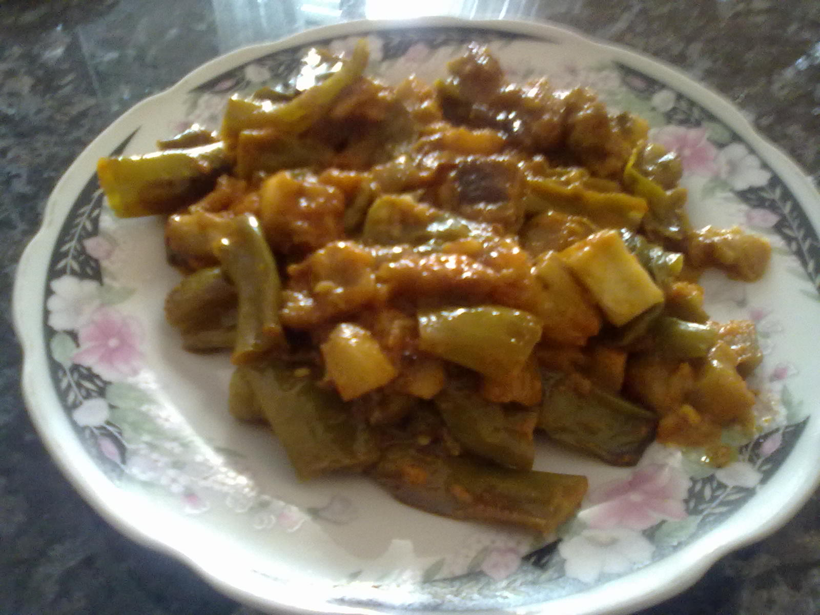 Ciambotta, tipico piatto della cucina meridionale